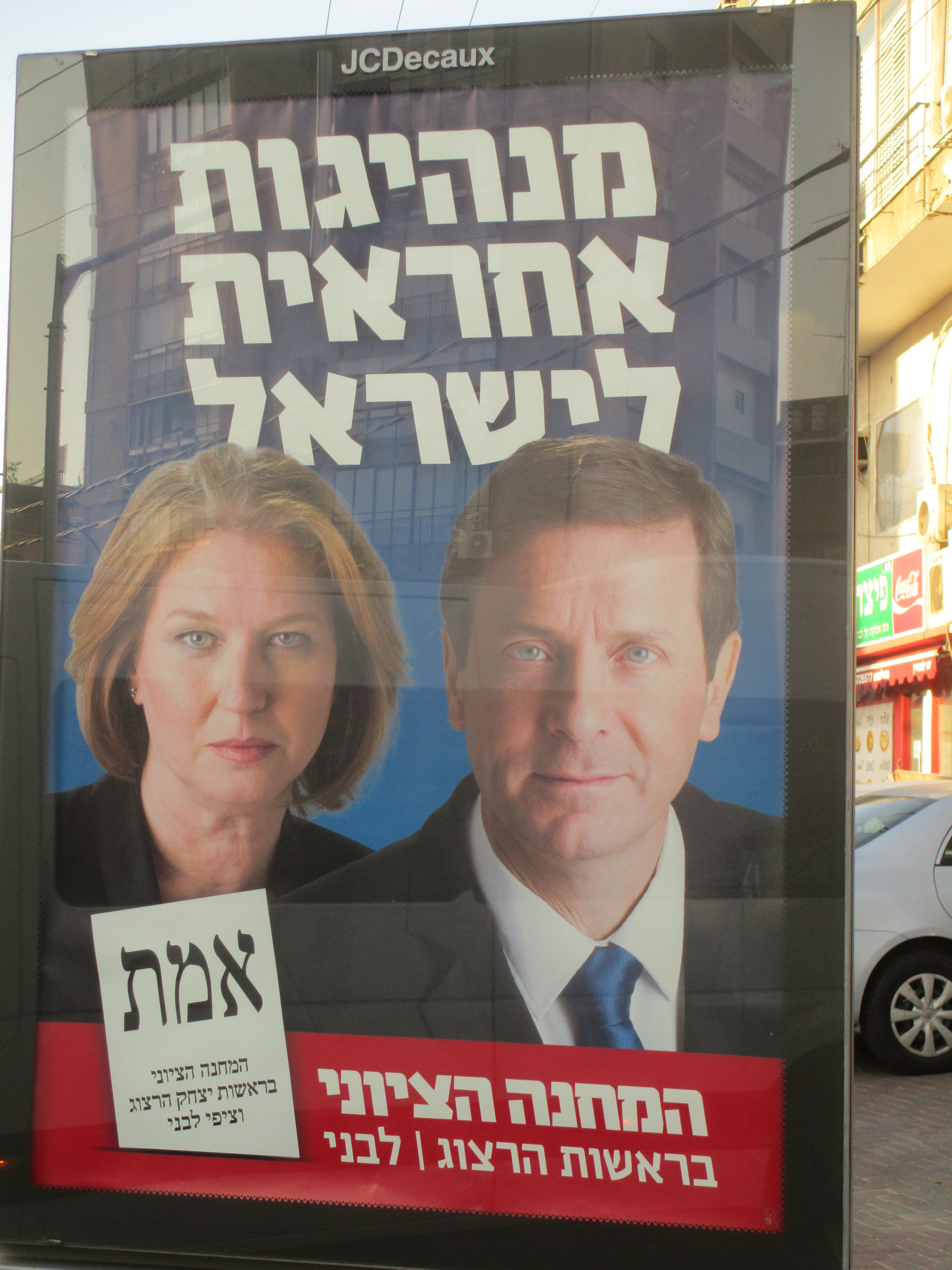 הרצוג ולבני בכרזת פרסומת למחנה הציוני